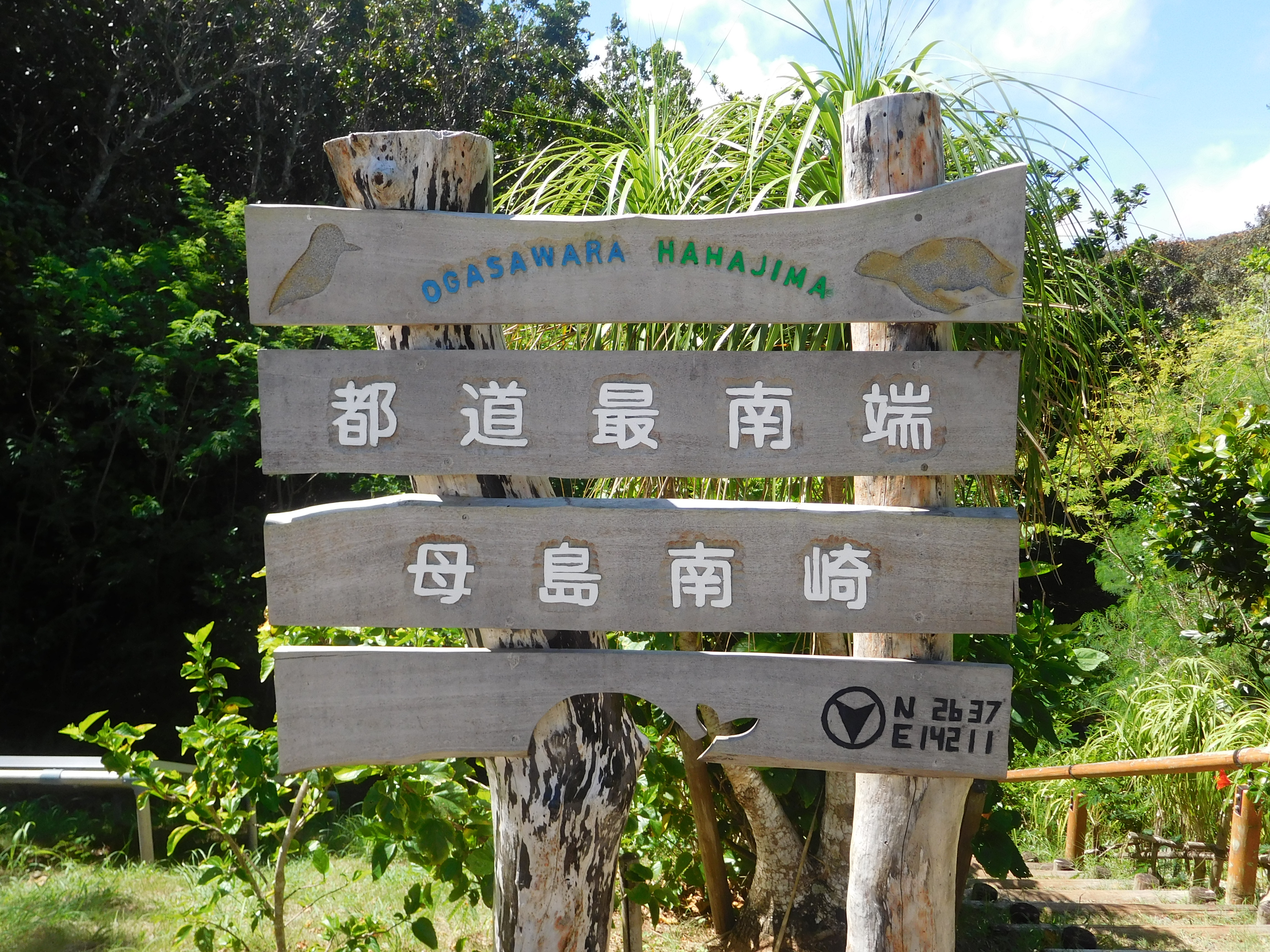 小笠原・母島の都道最南端の看板